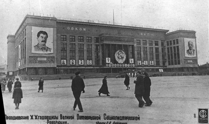 Здание обкома и облисполкома на площади Ленина в Воронеже